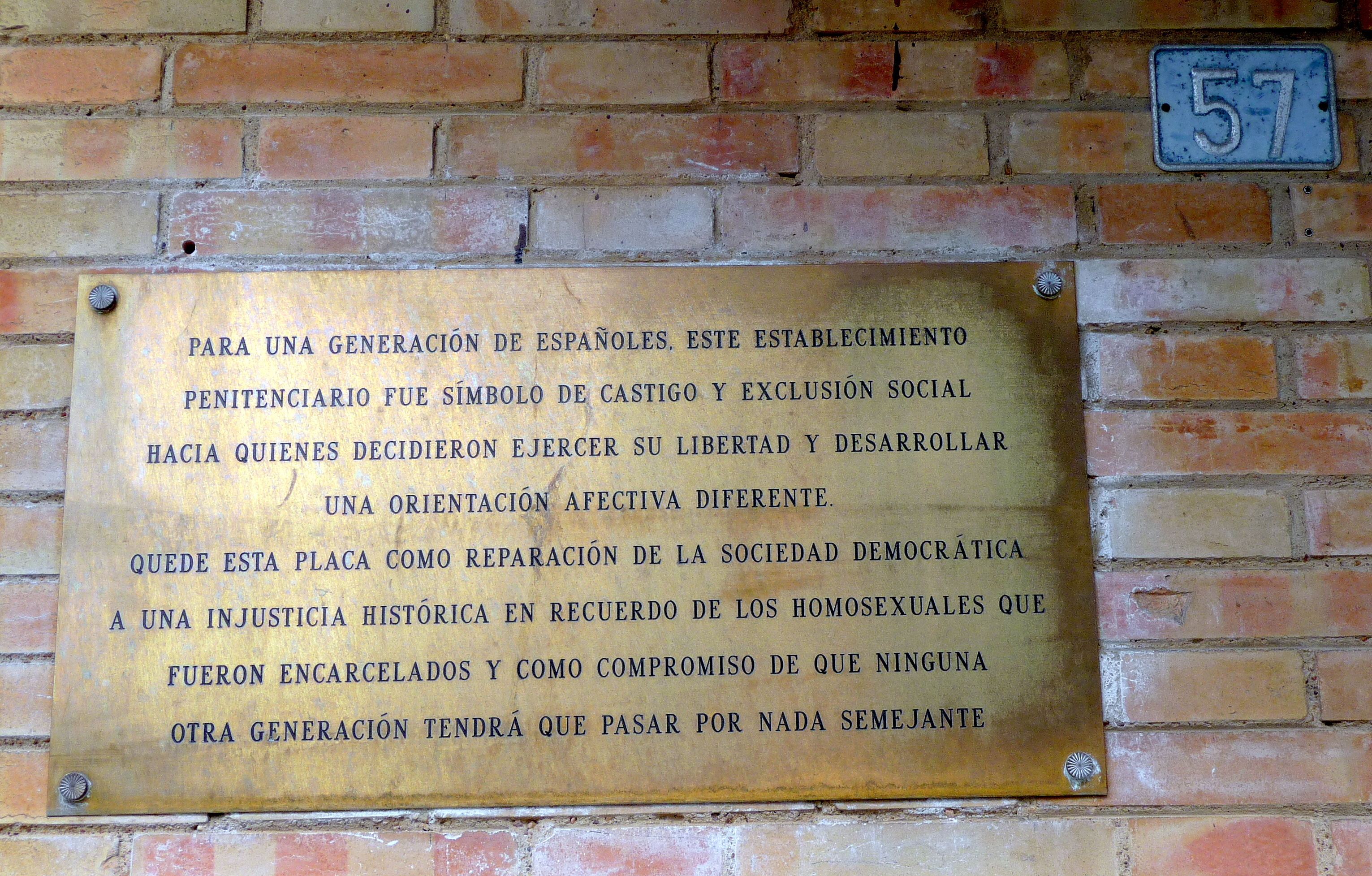 Placa homenaje en la cárcel de Huelva a los homosexuales encerrados en ella durante la dictadura franquista.